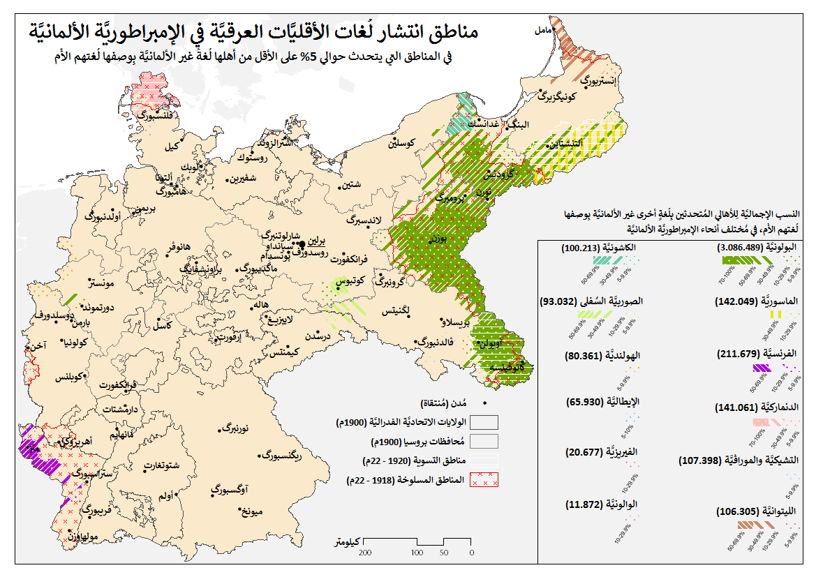 خريطة الإمبراطوريَّة الألمانيَّة في سنة 1900م تظهر عليها المناطق التي تسكنها الأقليَّات المُتحدثة بِلُغاتٍ غير الألمانيَّة.